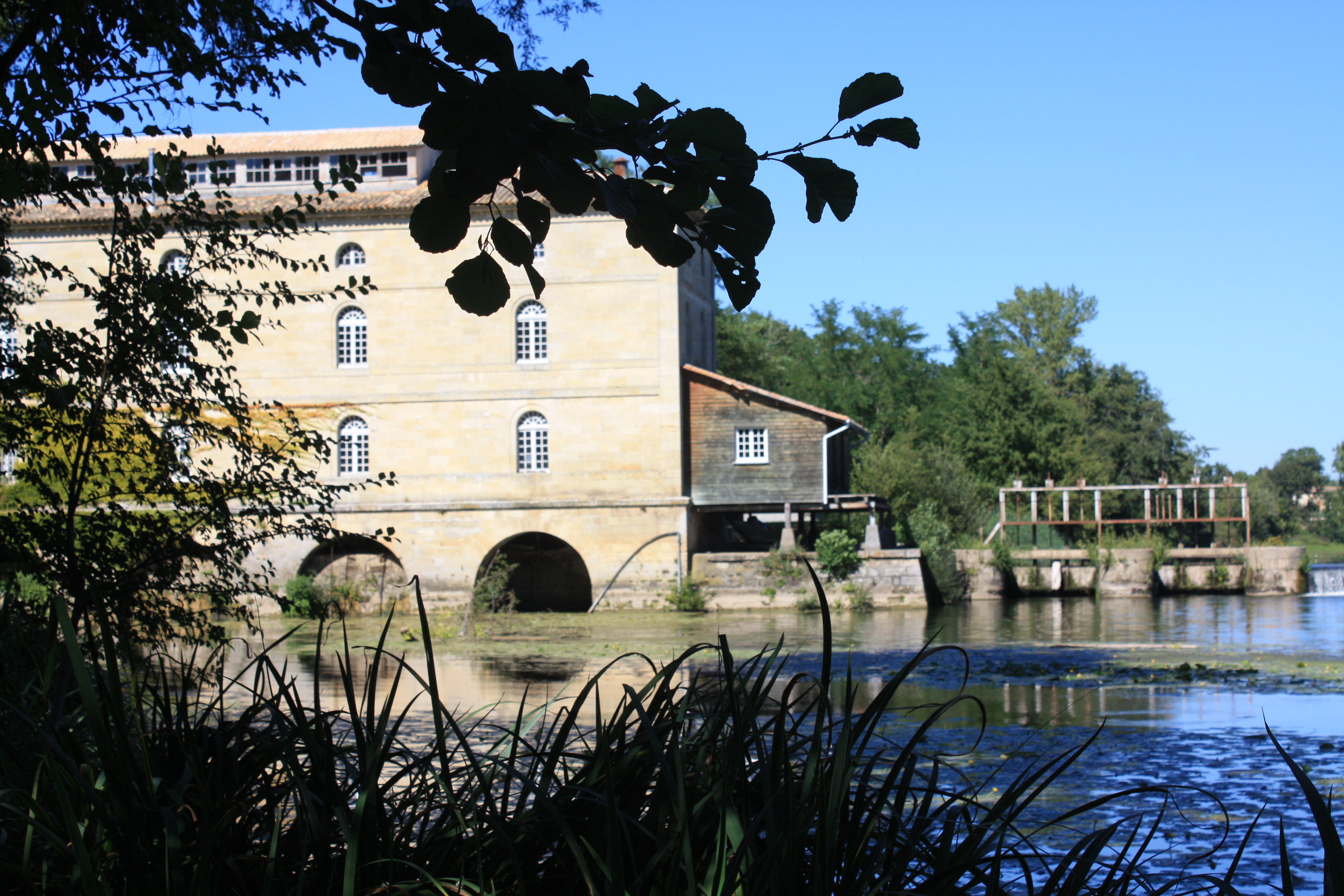 Moulin du Barrage (Inscrit) .